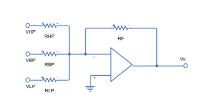 Biquad Allpass